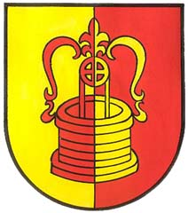 Der Brunnen, wie auch im Wappen dargestellt, gilt als Wahrzeichen von Deutsch Kaltenbrunn und wurde anläßlich der 700 Jahr-Feier am Hauptplatz der Marktgemeinde 1981 eingeweiht.